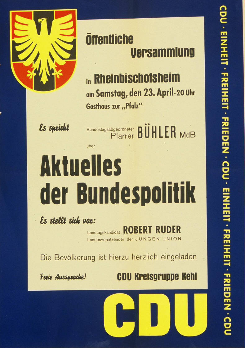 Öffentliche Versammlung Es spricht Bundestagsabgeordneter Pfarrer Bühler MdB über Aktuelles der Bundespolitik Es stellt sich vor: Landtagskandidat Robert Ruder Landesvorsitzender der Jungen Union ... Plakatart: Ankündigungsplakat Auftraggeber: CDU-Bundesgeschäftsstelle Bonn CDU Kreisgruppe Kehl Drucker_Druckart_Druckort: KVD Köln Objekt-Signatur: 10-001: 1076 Bestand: Plakate zu Bundestagswahlen (10-001) GliederungBestand10-18: Plakate zu Bundestagswahlen (10-001) » Die 4. Bundestagswahl am 17. September 1961 » CDU » Ankündigungsplakate Lizenz: KAS/ACDP 10-001: 1076 CC-BY-SA 3.0 DE